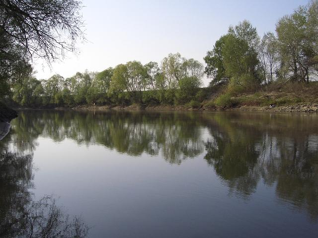 A Szamos folyó